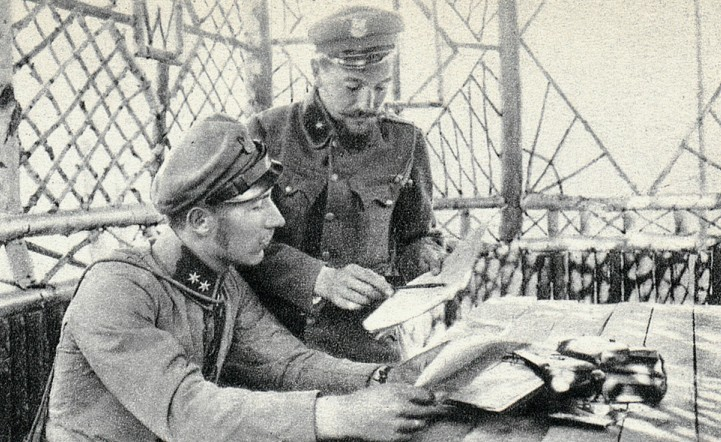 Dowódca batalionu por. Józef Gigiel (ps. Traunicht) z adiutantem 6 pułku piechoty ppor. St. Świtalskim.